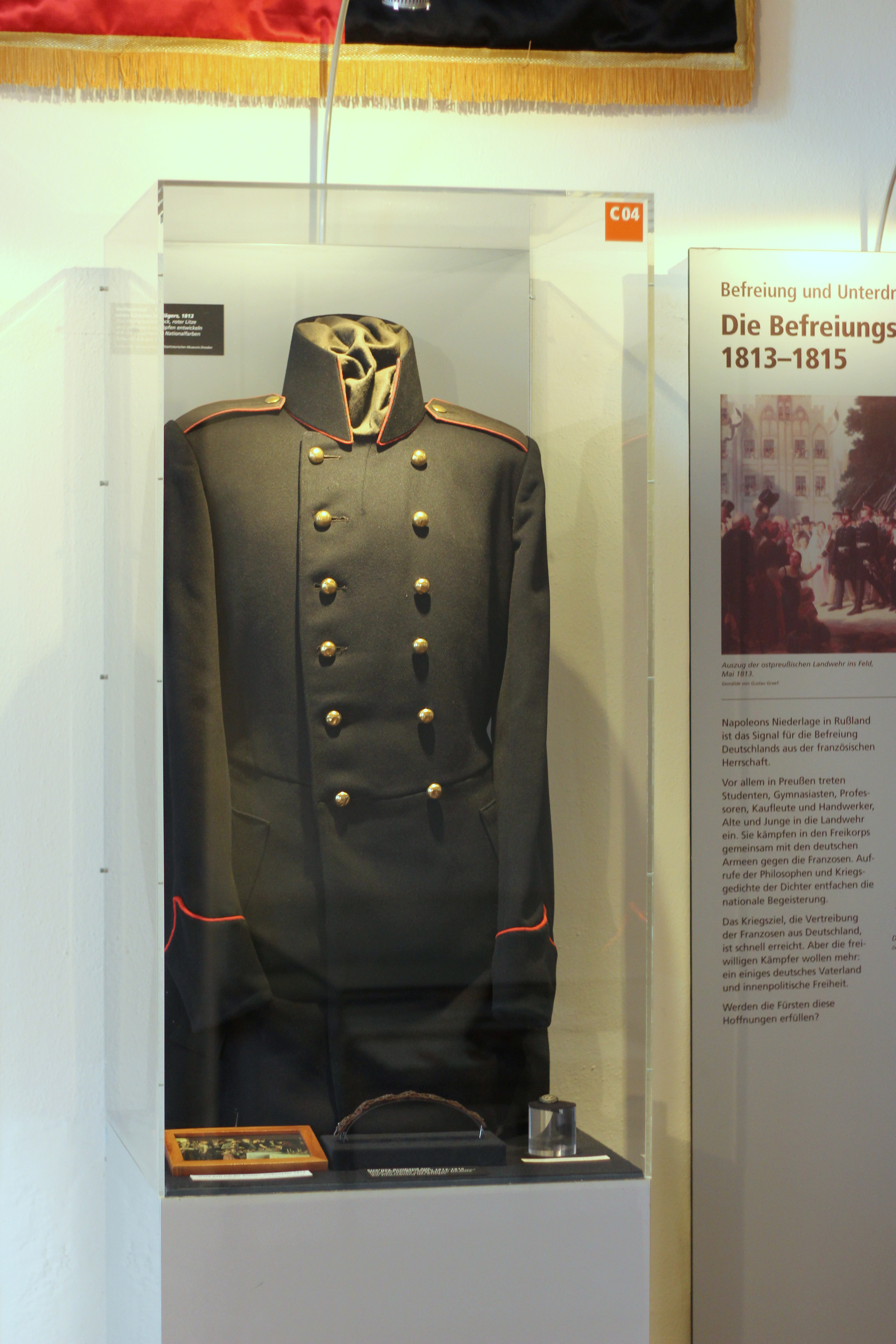 Erinnerungsstätte für die Freiheitsbewegungen in der deutschen Geschichte. Uniform Lützowsches Freikorps.